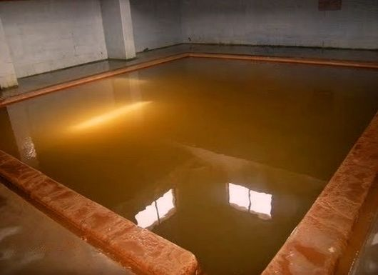 Ortaköy Çermiği - İç